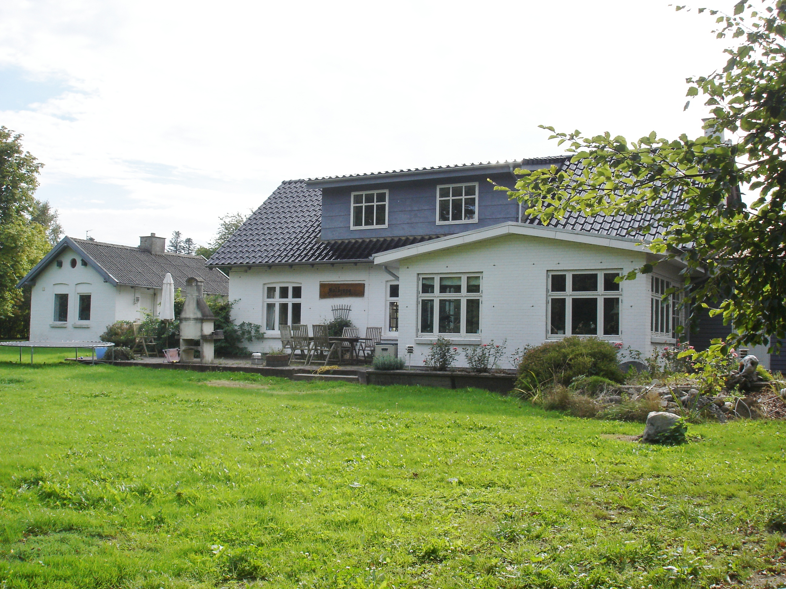 Solbjerg Station fra sporsiden